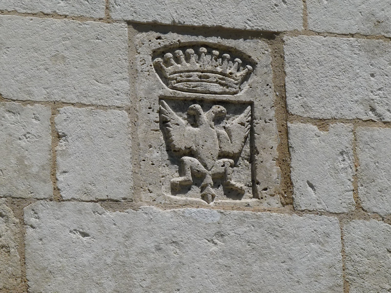 Aigle bicéphale, portail du château de Villebois-Lavalette, Charente, France. Blason des de Fleury, propriétaires du château au début du 20è siècle.